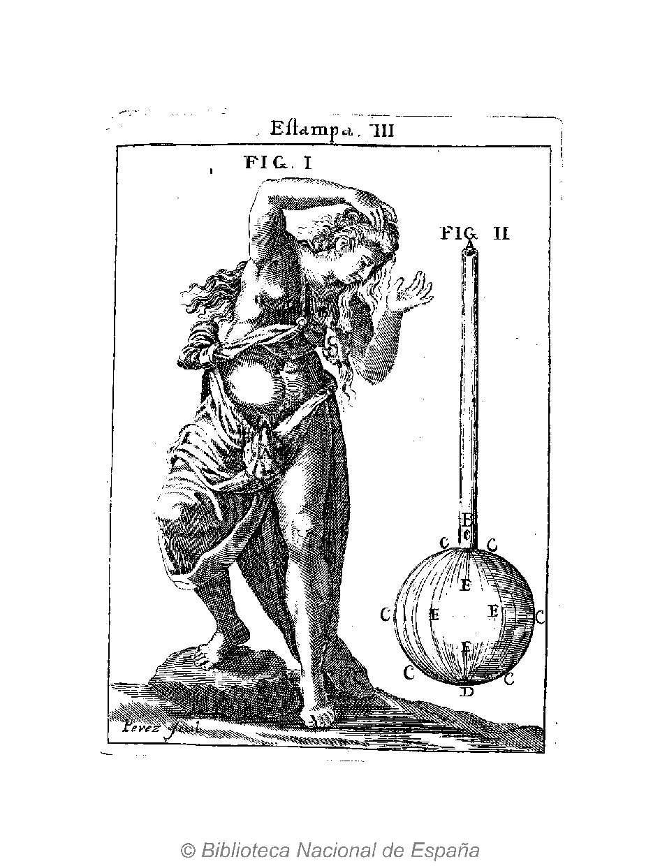 Ilustracion, y publicacion de los diez y siete secretos del Doctor Juan Cuervo Semmedo : confirmadas sus virtudes con maravillosas observaciones su autor el Doctor don Francisco Suarez de Ribera ... Autor: Suárez de Ribera, Francisco Fecha: 1732 Datos de edición: En Madrid, en la imprenta de Domingo Fernandez de Arrojo